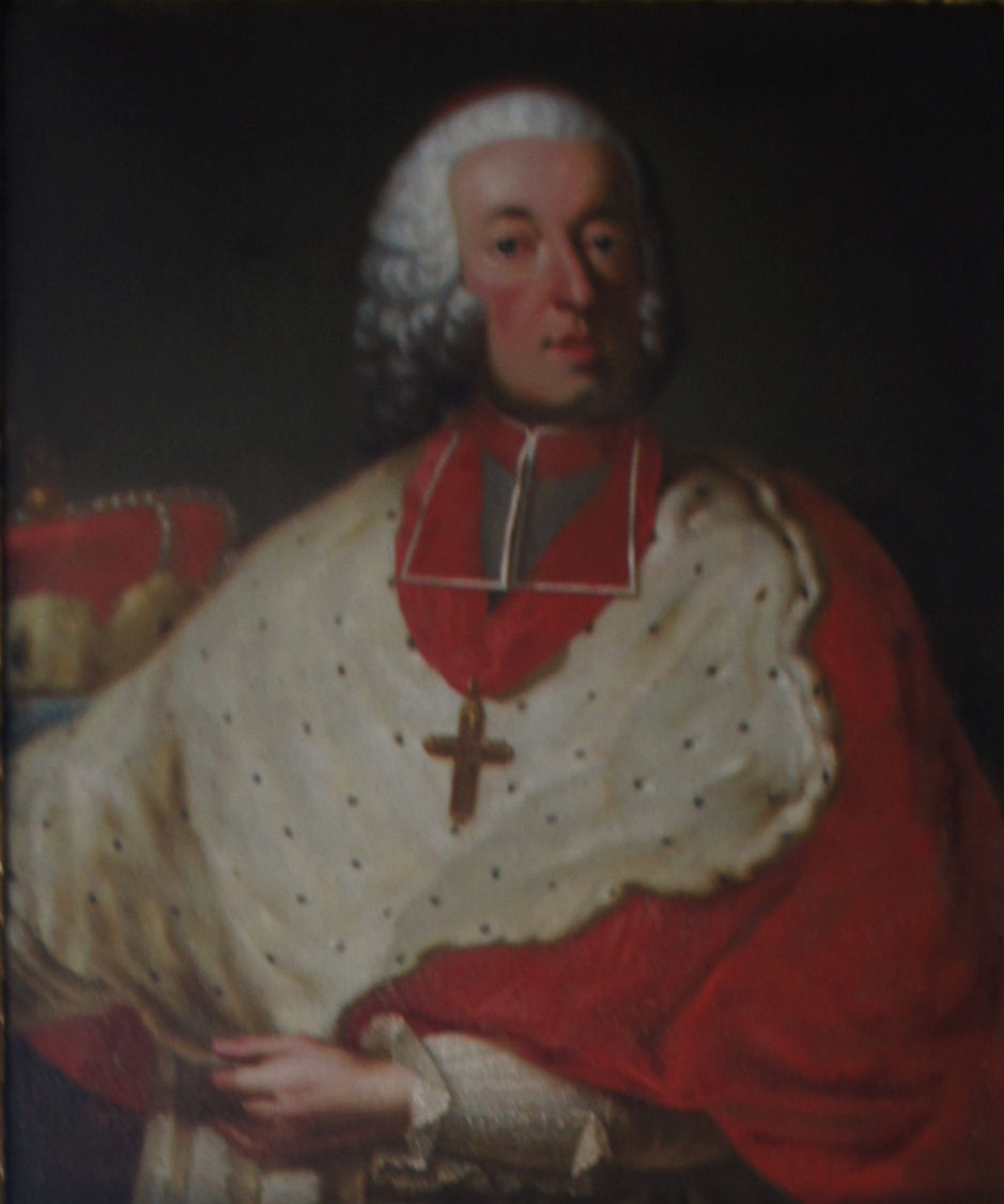 Porträtgemälde von Kardinal Johann Theodor von Bayern, Fürstbischof von Freising, im Fürstengang zwischen Fürstbischöflicher Residenz und Freisinger Dom.